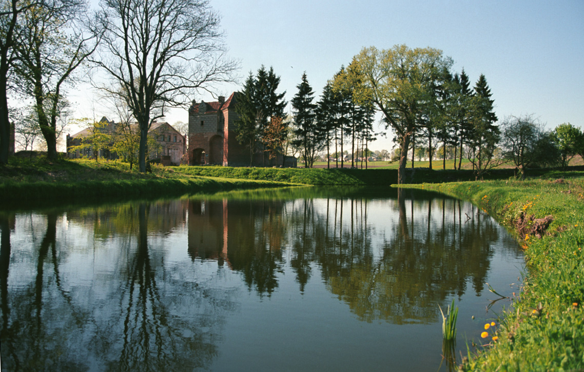 Stara Kiszewa, zamek kiszewski